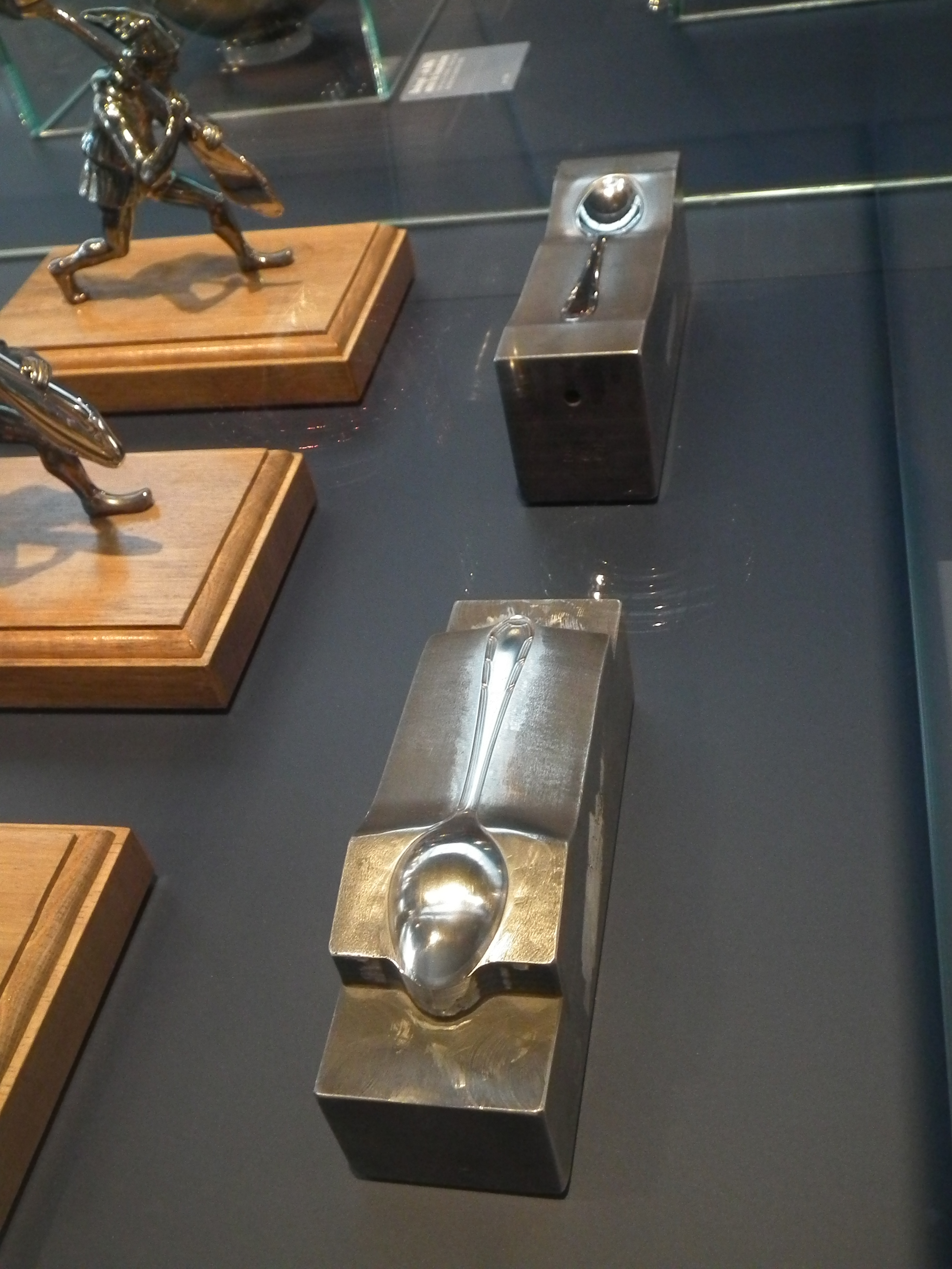 Industriemuseum Chemnitz